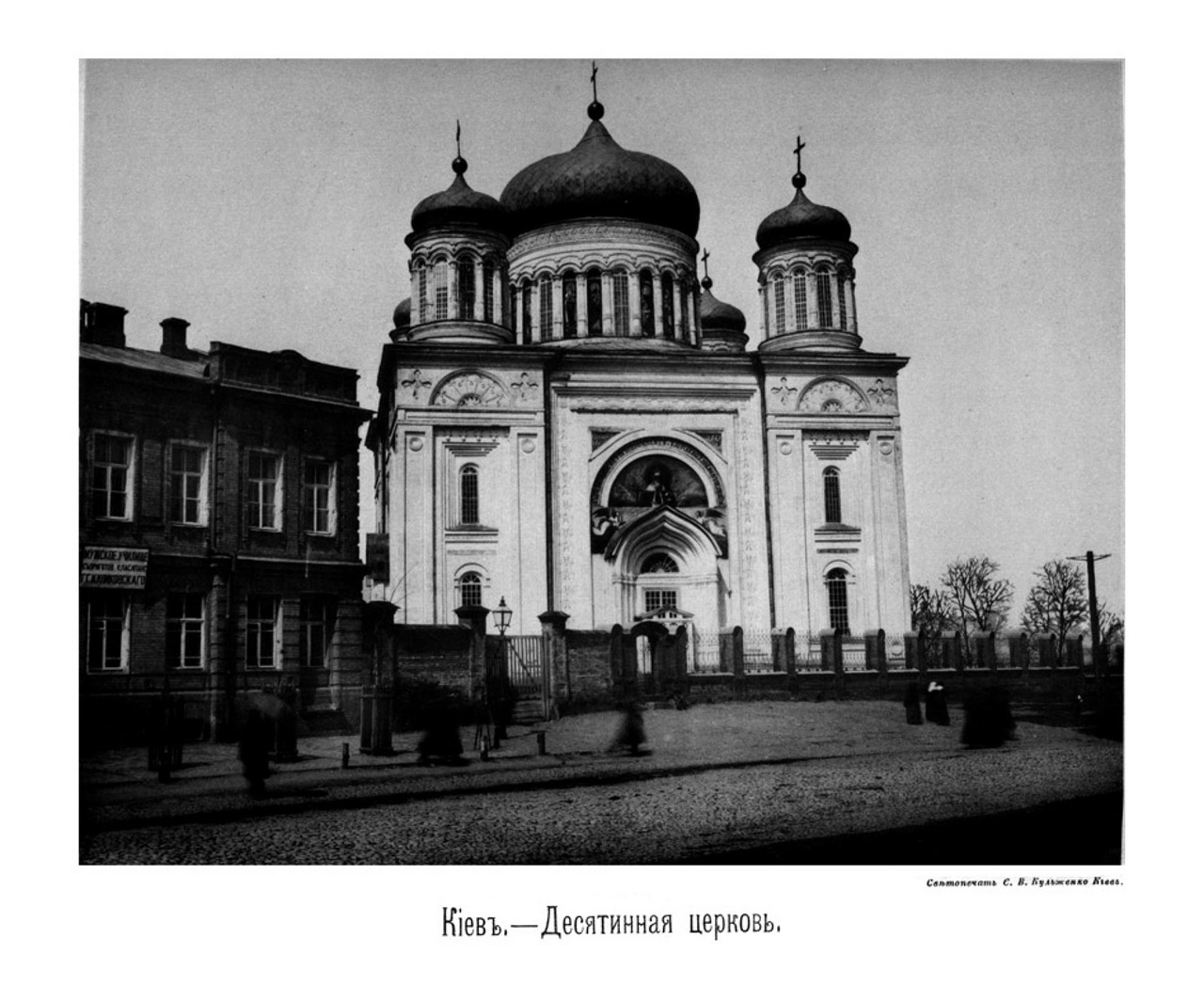 Десятинна церква Київ (Church of the Tithes Kyiv),1888